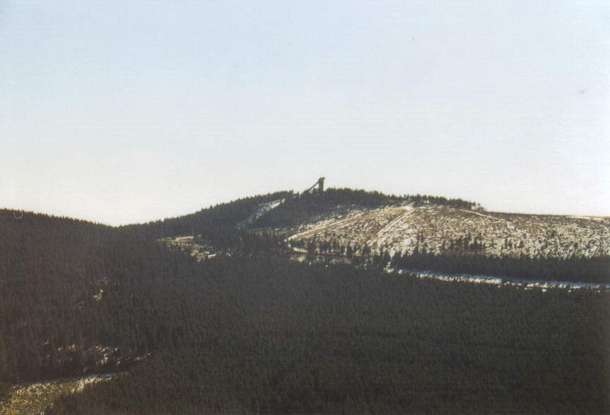 Der Wurmberg von einem Zug der Brockenbahn am 23. März 2003 aus gesehen.